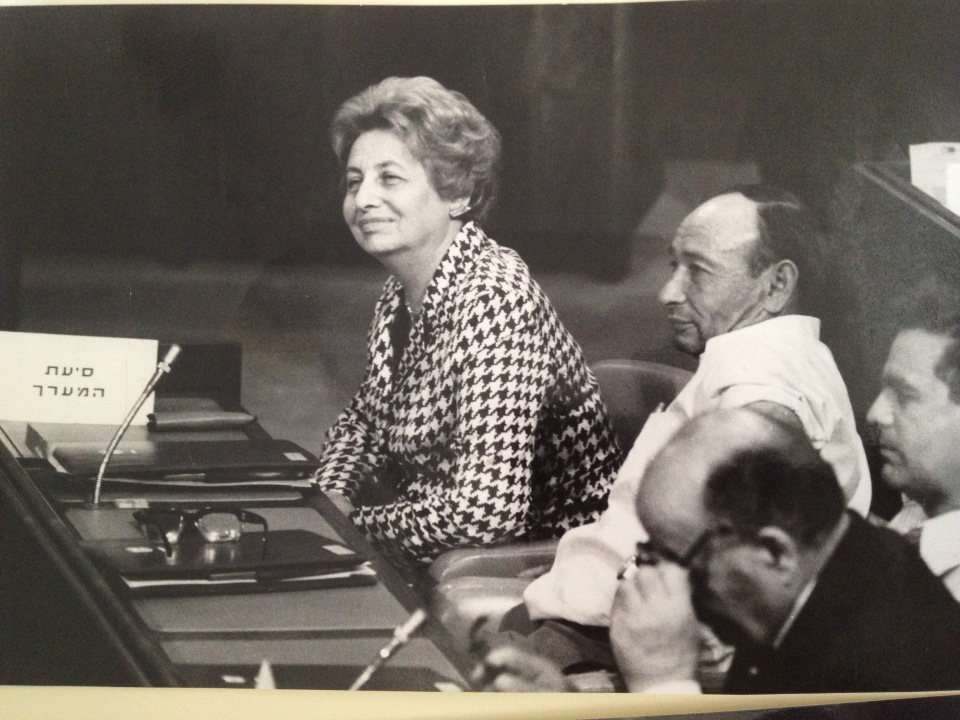 תמר אשל עם פתיחת הכנסת ה-9, יולי 1977